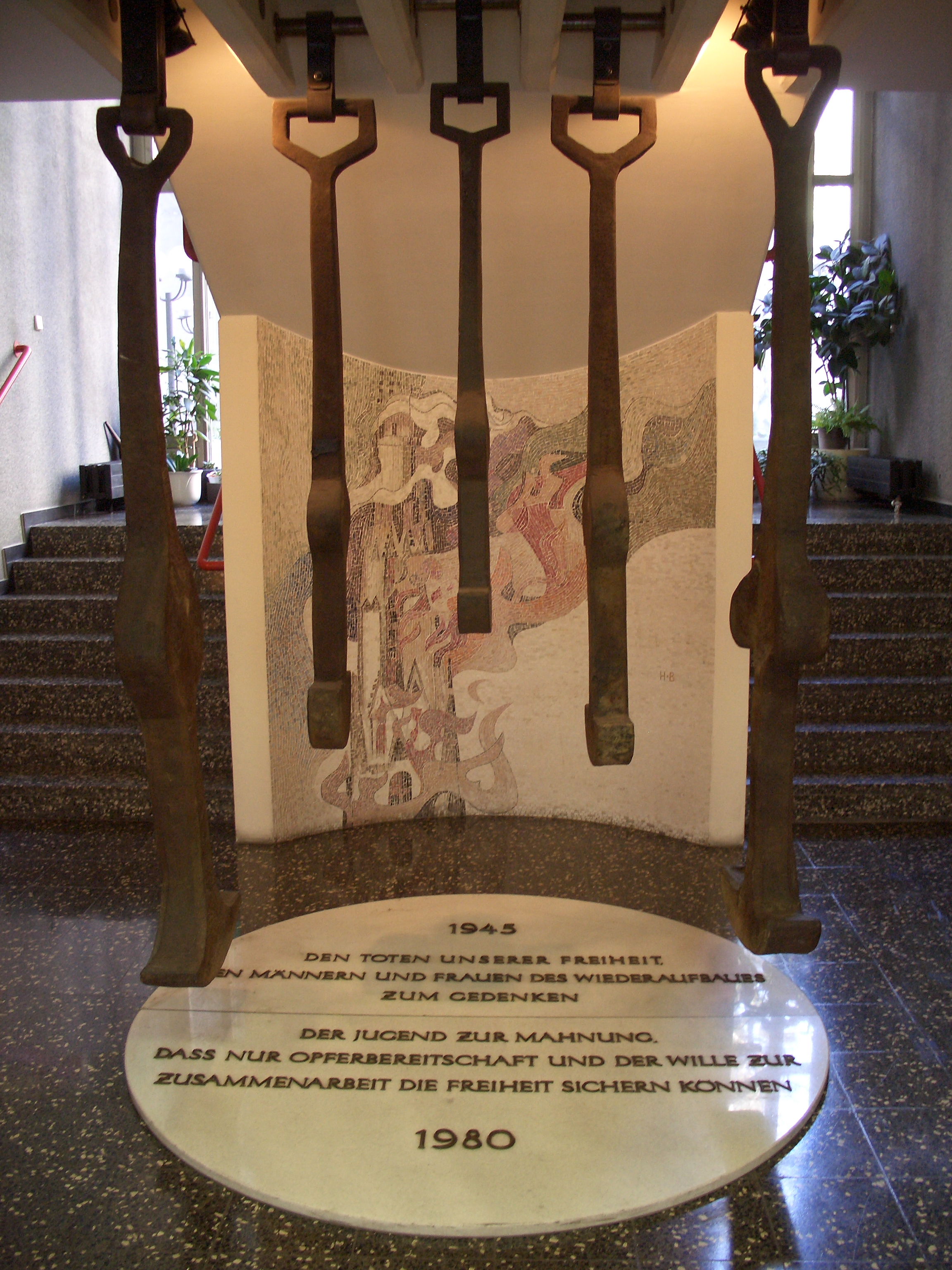 Die Klöppel der zerstörten Glocken von St. Stephan in der Zentralen Geschäftsstelle der ÖJAB in Wien.